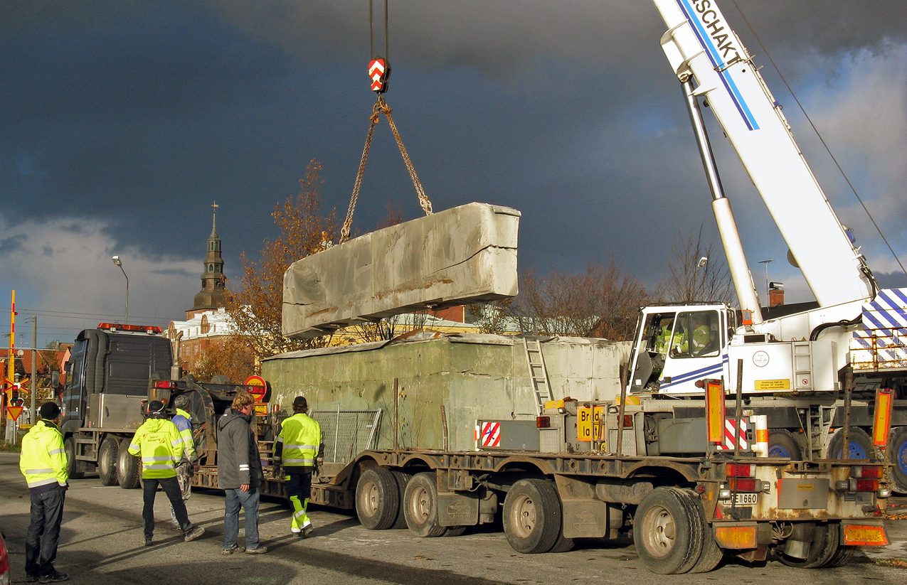 Stridsledningsbunkern på Båtmansgatan i Ystads hamn demonterades i nov 2010. Det över 100cm tjocka taket skivades upp i bitar och transporterades ut till Världens ände, där de maldes ner till grus, ämnad för nyproduktion.